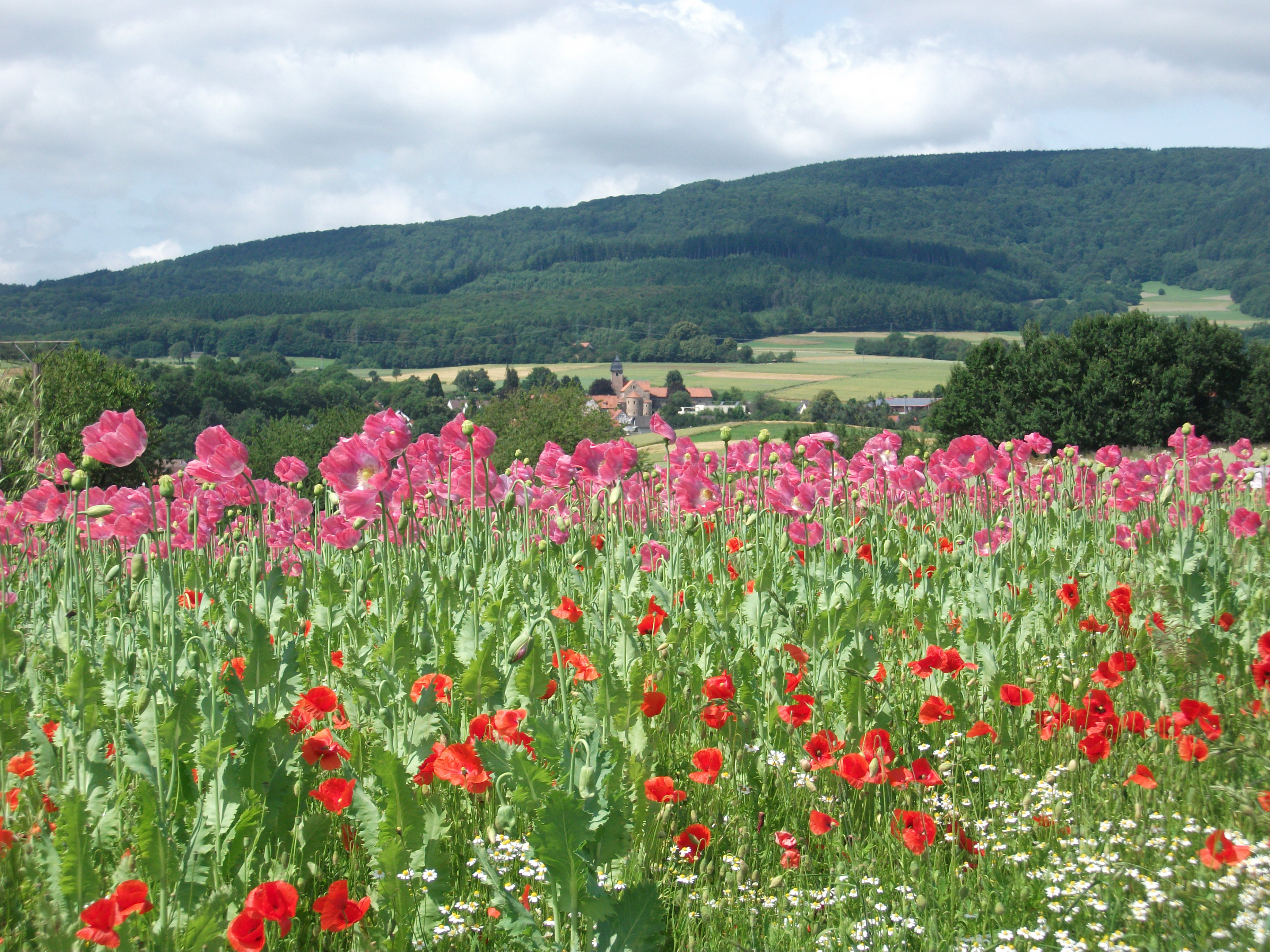 Der Mohnanbau in Germerode am Hohen Meißner begann in 2010 und in jedem folgenden Jahr vergrößerte sich die Anbaufläche. Anfangs blühte der Mohn auf 1,5 Hektar, in 2018 wurden schon rund 20 Hektar bestellt. Mit der Zahl der Felder wuchs auch die Zahl der Besucher. In 2017 sollen es 25.000 gewesen sein, schätzten die Verantwortlichen. Die Felder sind nicht umzäunt und frei zugänglich. Rund um die Blüte, die meist nicht vor Ende Juni beginnt, gibt ein umfangreiches Veranstaltungsprogramm.